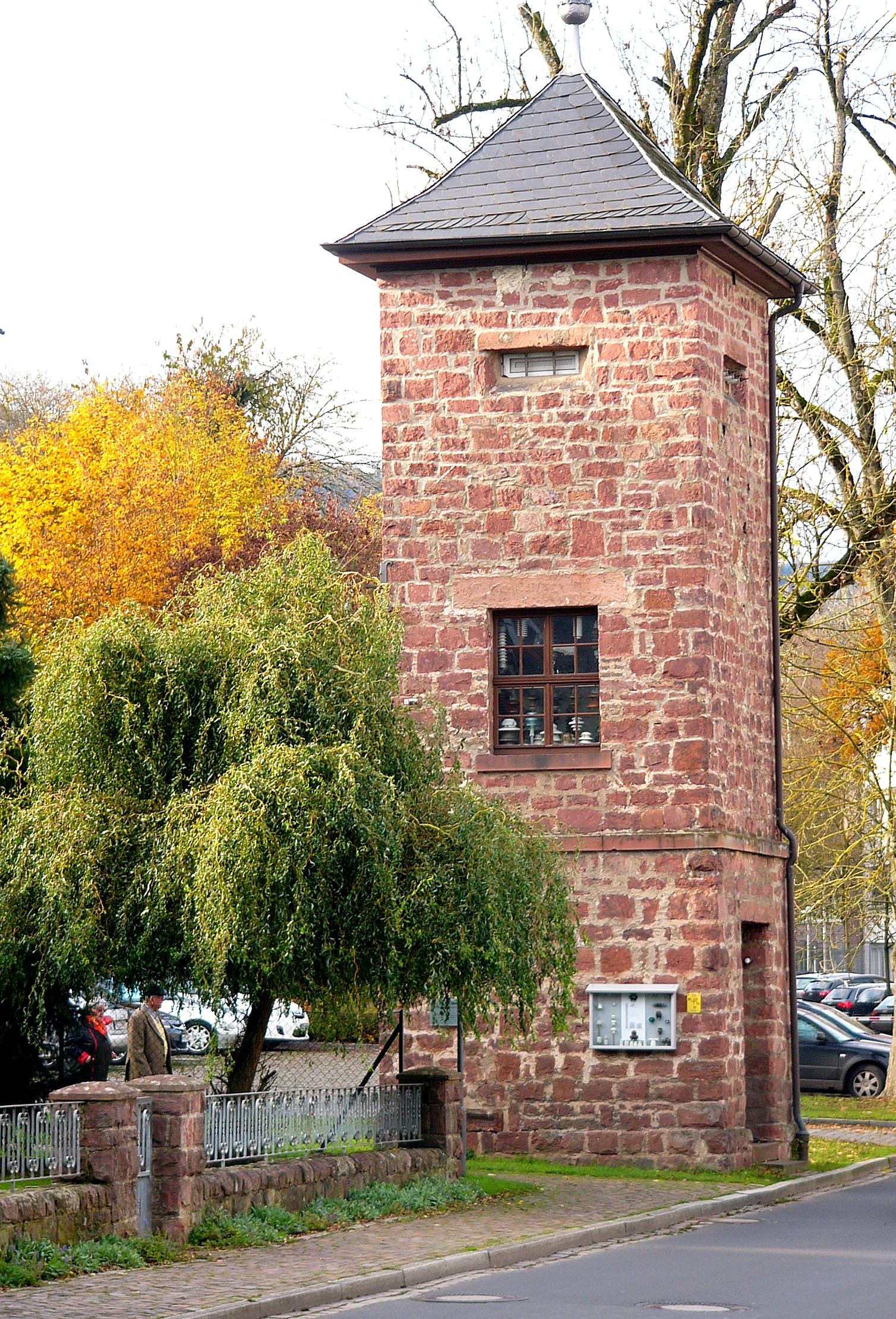 Transformatorenhaus; turmartiger Bruchsteinbau mit Pyramidendach, Wetterfahne, bez. 1920. This is a photograph of an architectural monument.